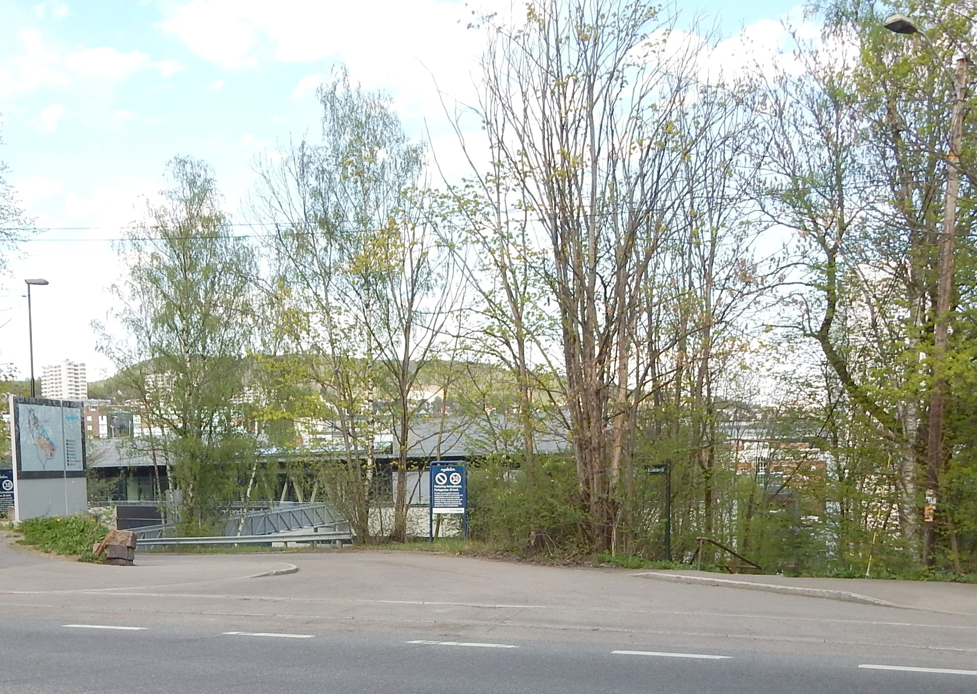 Nydalen Bruks vei sett fra Maridalsveien